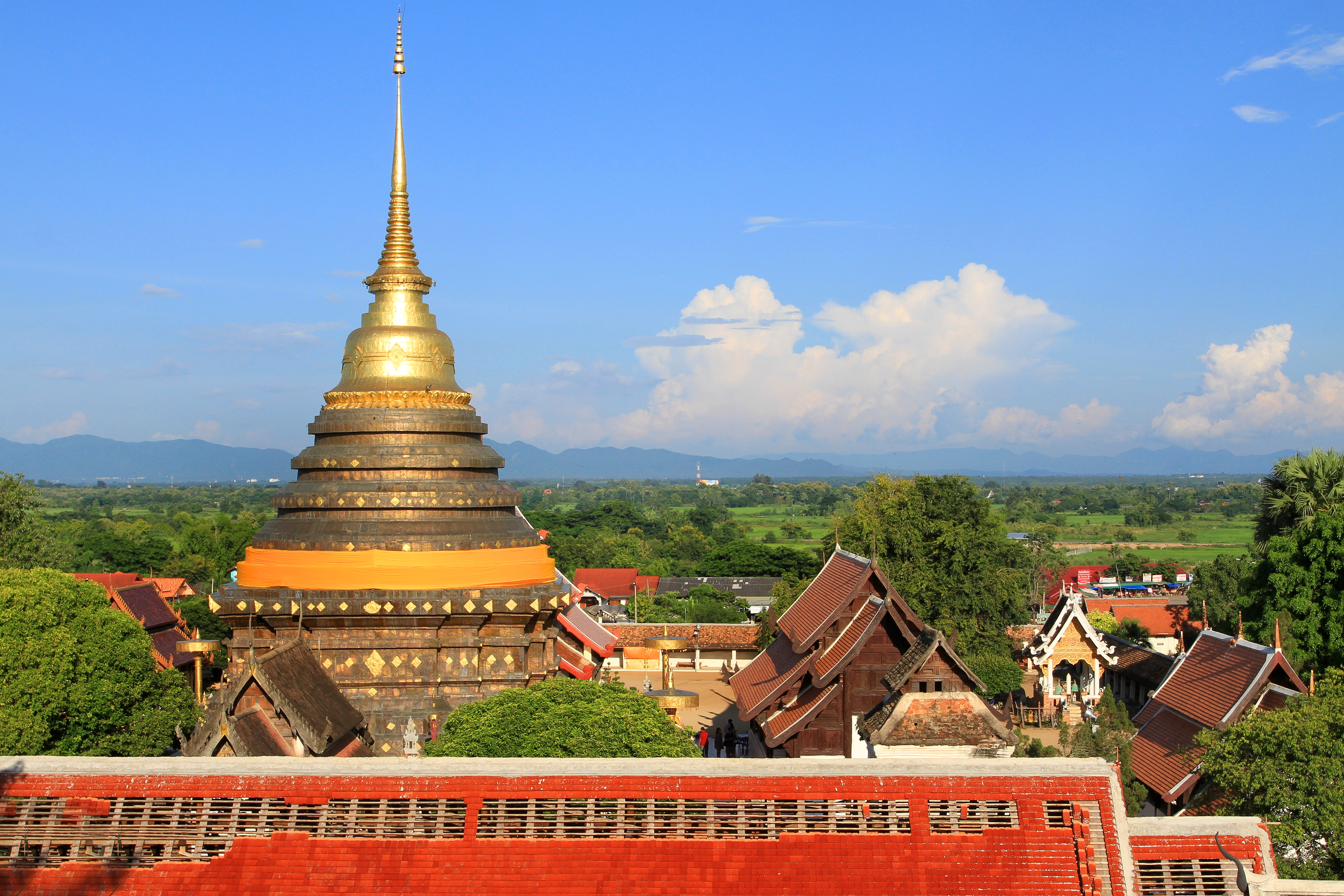 โบราณที่ทรงคุณค่าและงดงามที่อยู่กับประเทศไทยมาตั้งแต่อดีตจนถึงปัจจุบัน